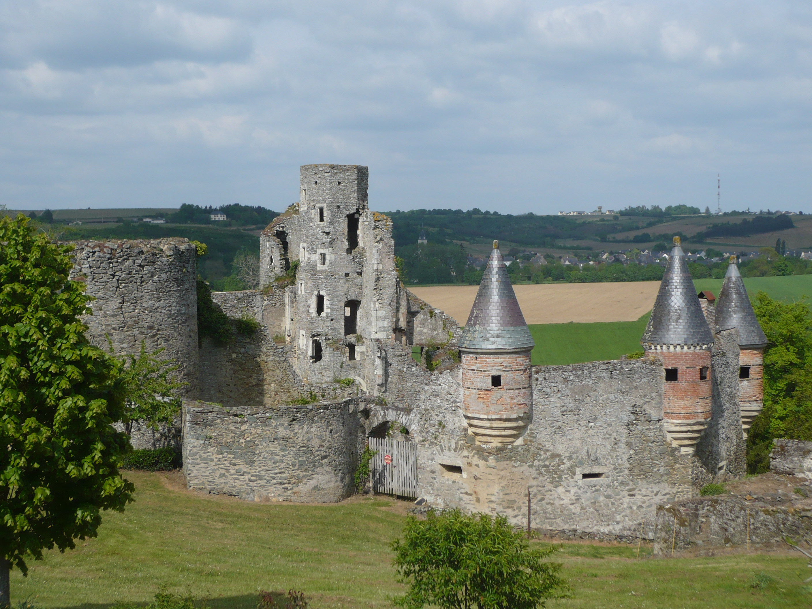 Vue général du château de la Haute-Guerche, en Anjou.